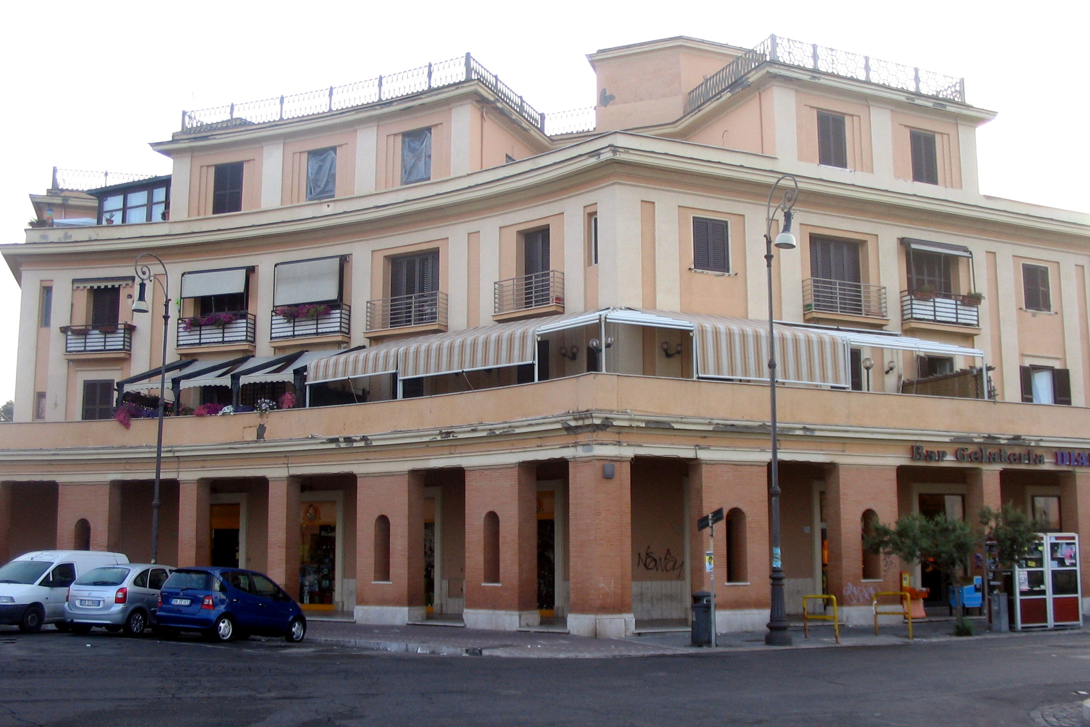 Ice cream parlour "Diamante" in Ostia (Rome)